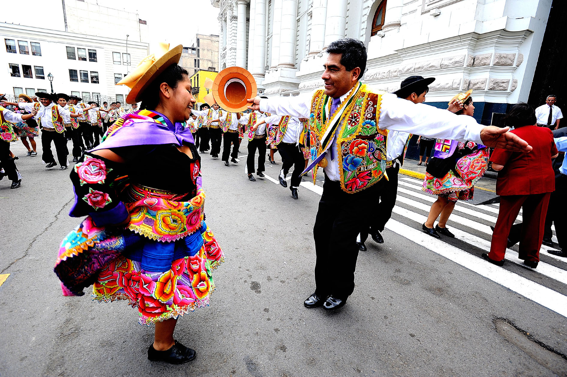 Un vistoso desfile de danzas vernaculares tuvo lugar hoy en la Plaza Bolívar como parte de las actividades previas al Carnaval de la Nación Huanca 2012-Huaylarsh para el mundo. En la actividad, cuya previa conferencia de prensa ofrecieron los parlamentarios Casio Huaire y Federico Pariona, estuvieron autoridades del departamento de Junín.